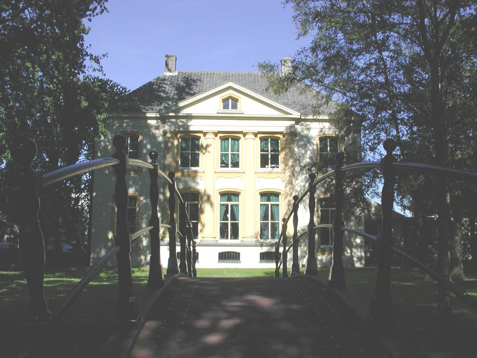 Vooraanzicht Pieter Huyser Huis te Chaam